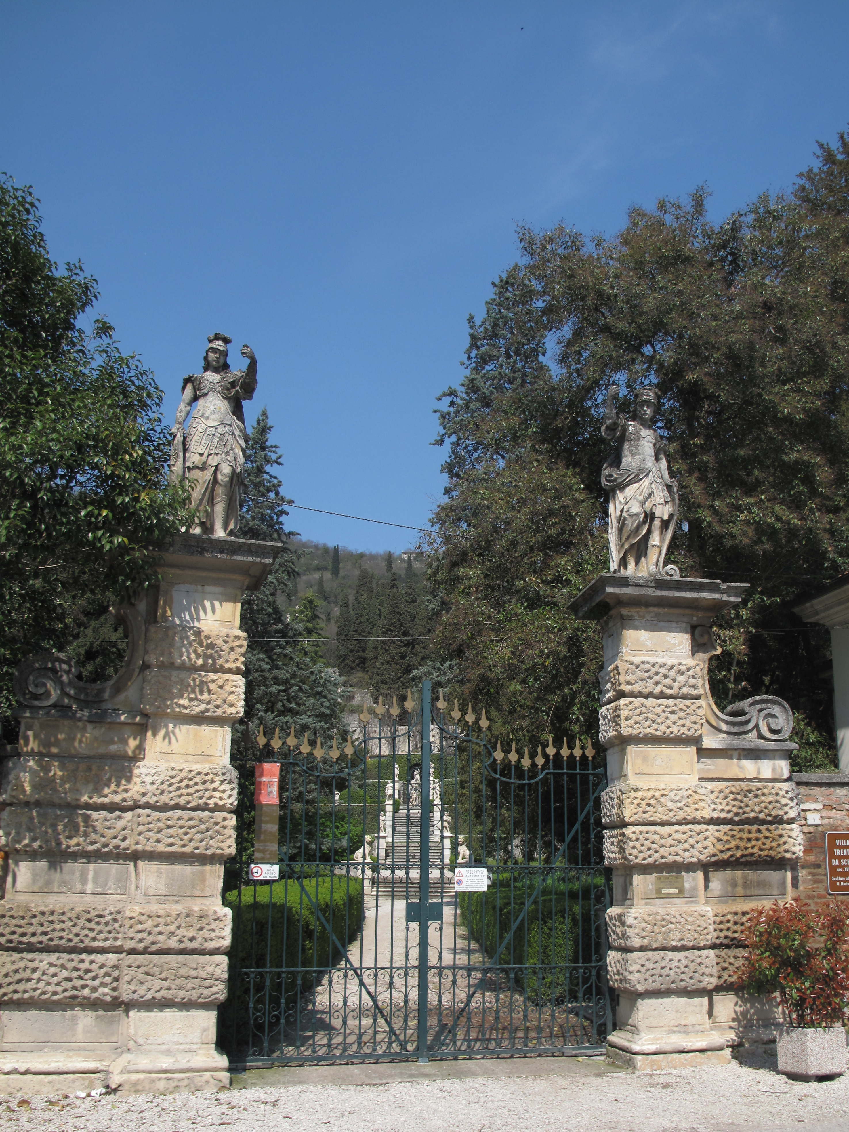 Costozza di Longare - Giardini della villa Da Schio